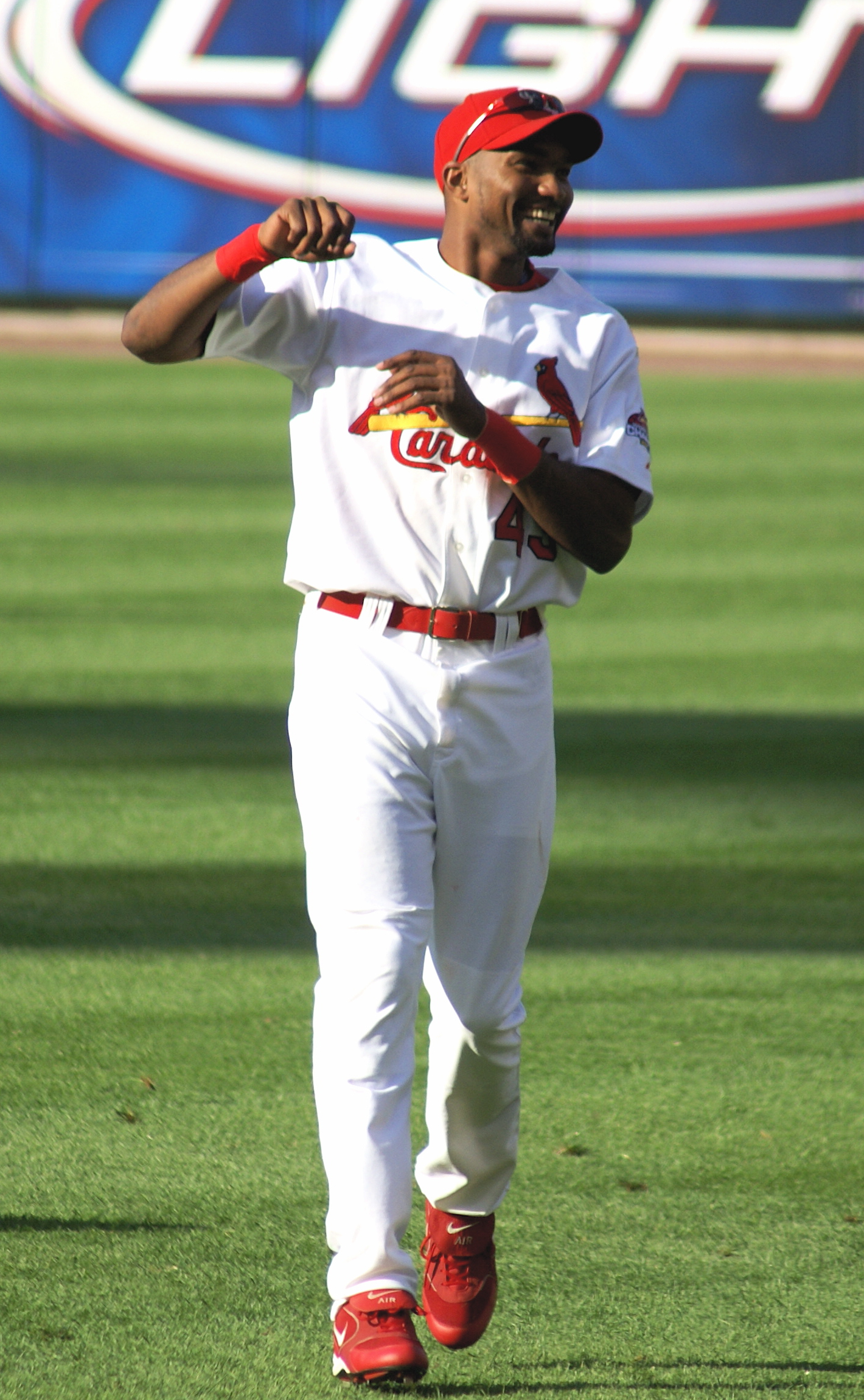 Juan Encarnación